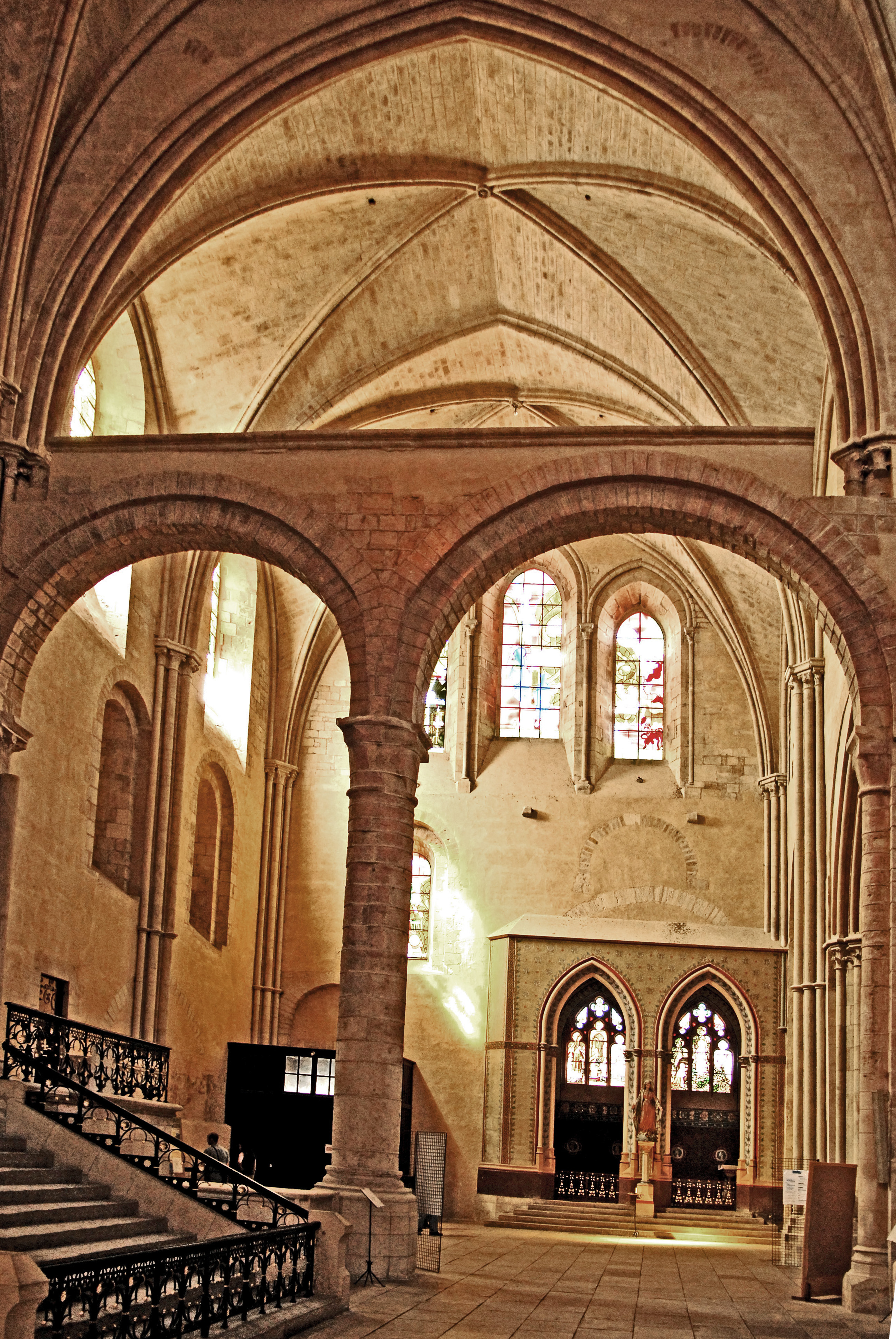 Kathedrale Nevers, Querhaus Nordarm aus Vierung